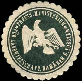 Sealing stamp Title: Preuss. Ministerium für Landwirtschaft, Domänen und Forsten Description: grün, weiß, geprägt Place: Berlin size: 4 cm